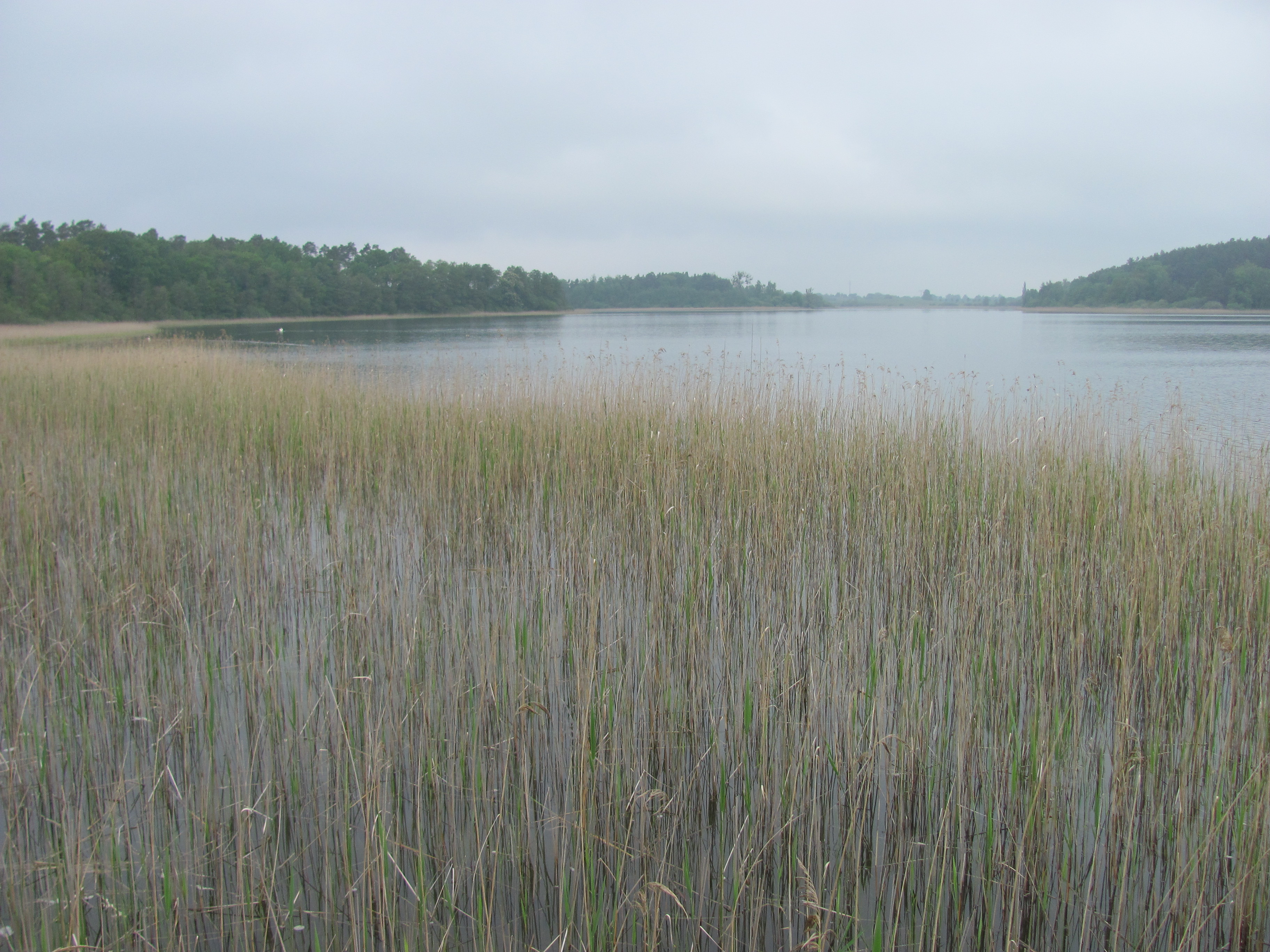 Blick vom Beobachtungspunkt am Südende des Feisnecksees